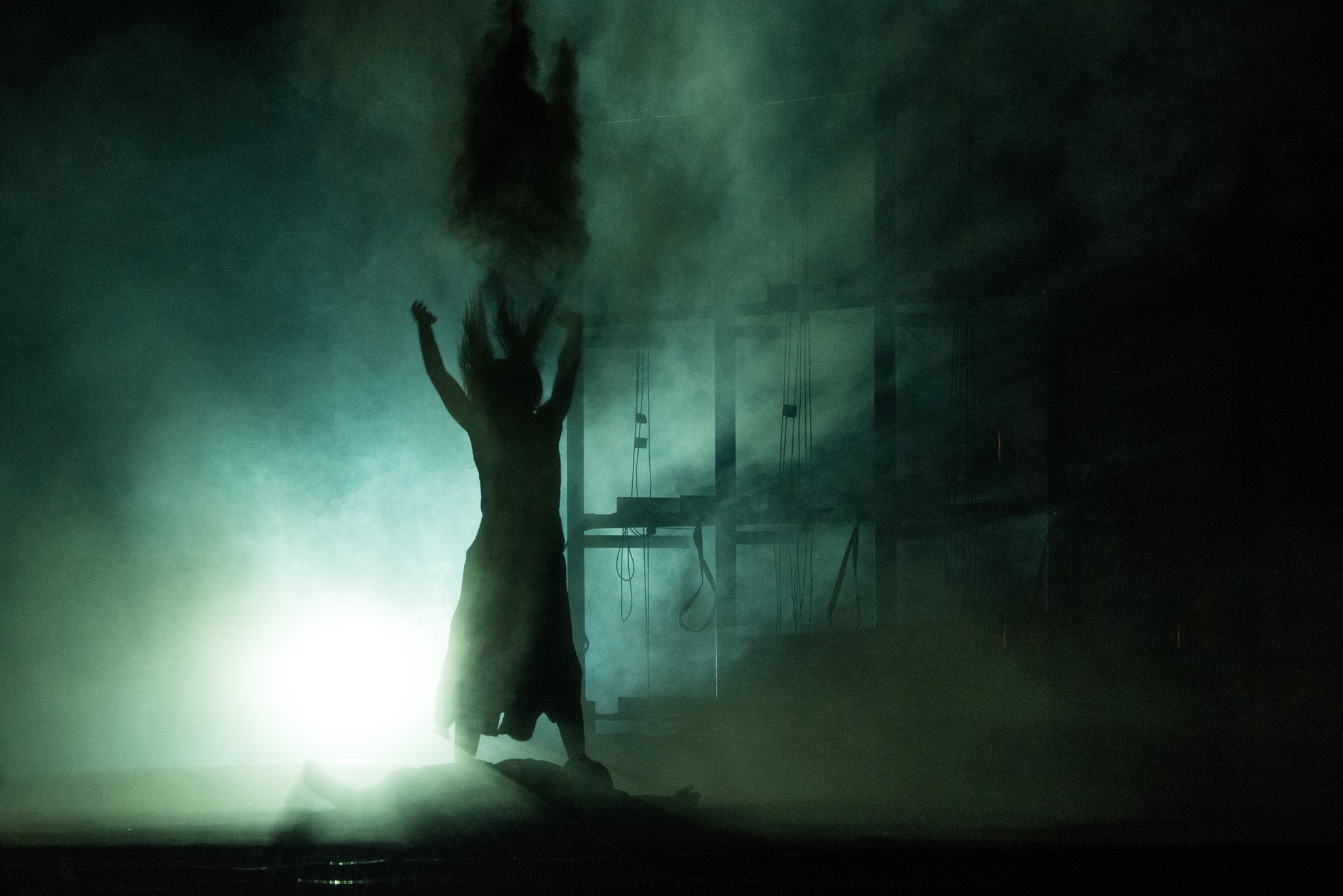 Antigone by Sophokles, Burgtheater 2015